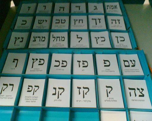 פתקי הצבעה בבחירות לכנסת השבע-עשרה